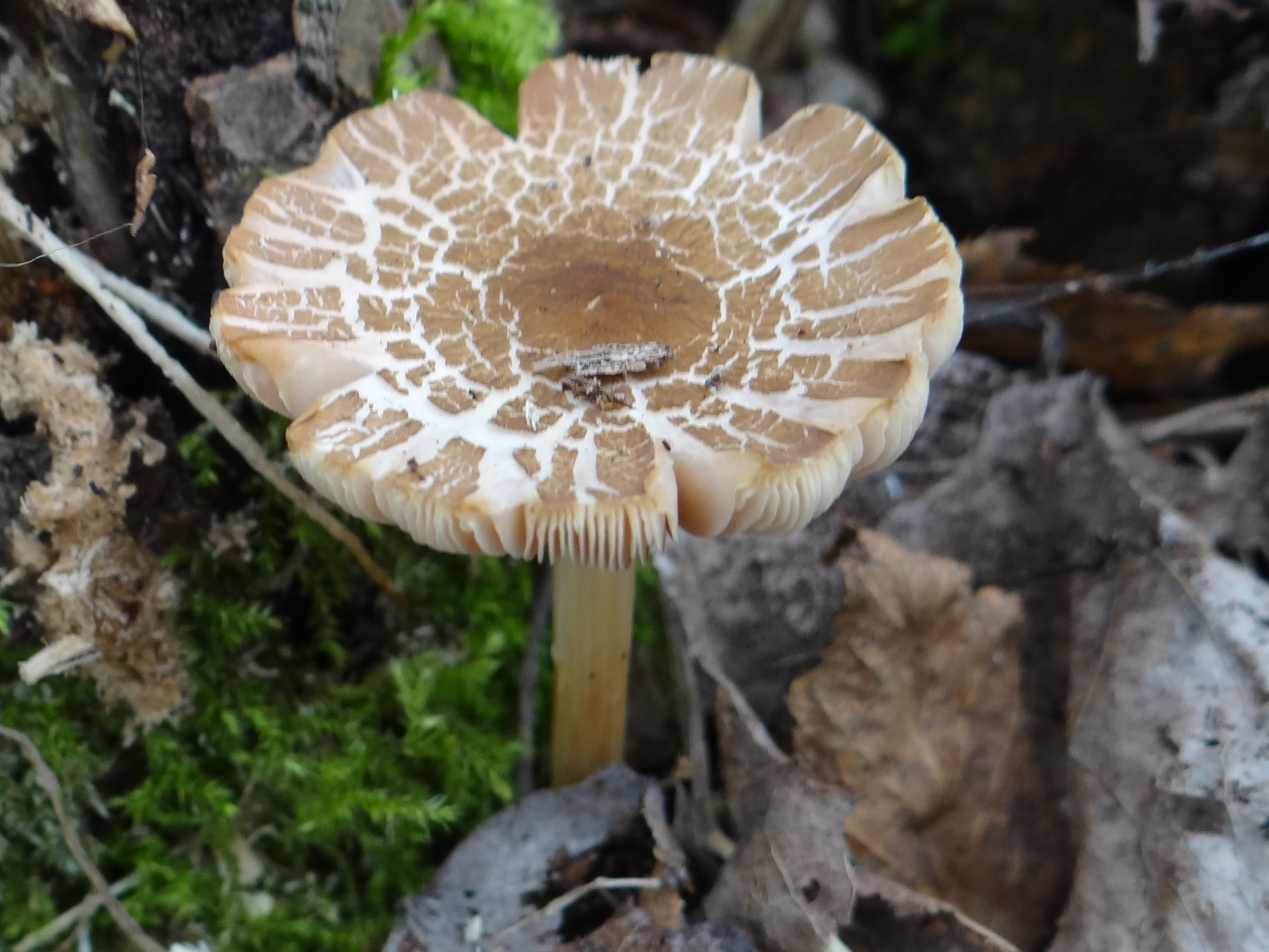 Lepiota clypeolaria (location:Poland, Pogórze Wiśnickie, Leszczyna (powiat bocheński)